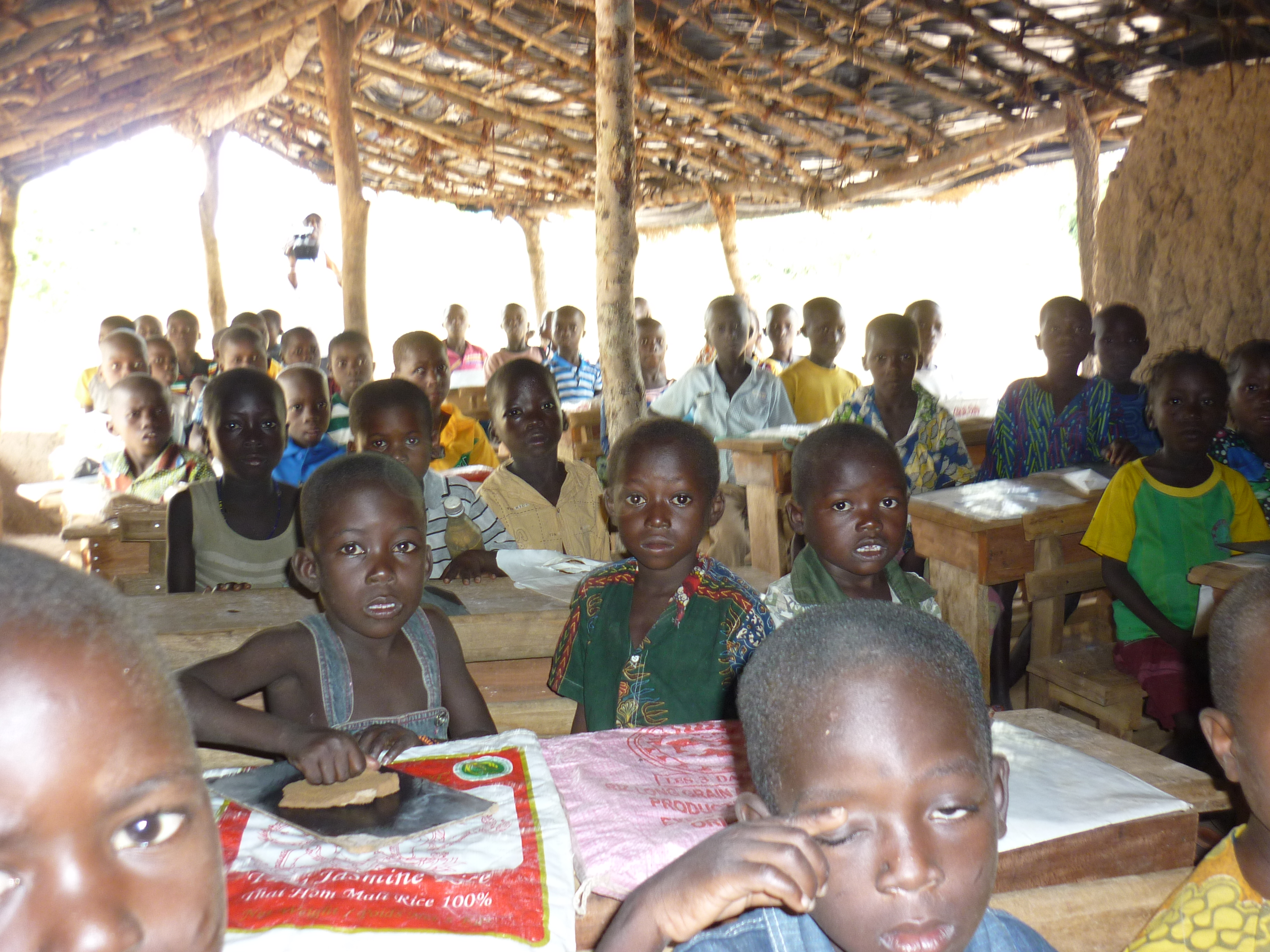 Un enseignant dans une zone rurale de la Côte d'Ivoire avec une classe de primaire. This is an image of "African people at work" from Ivory Coast